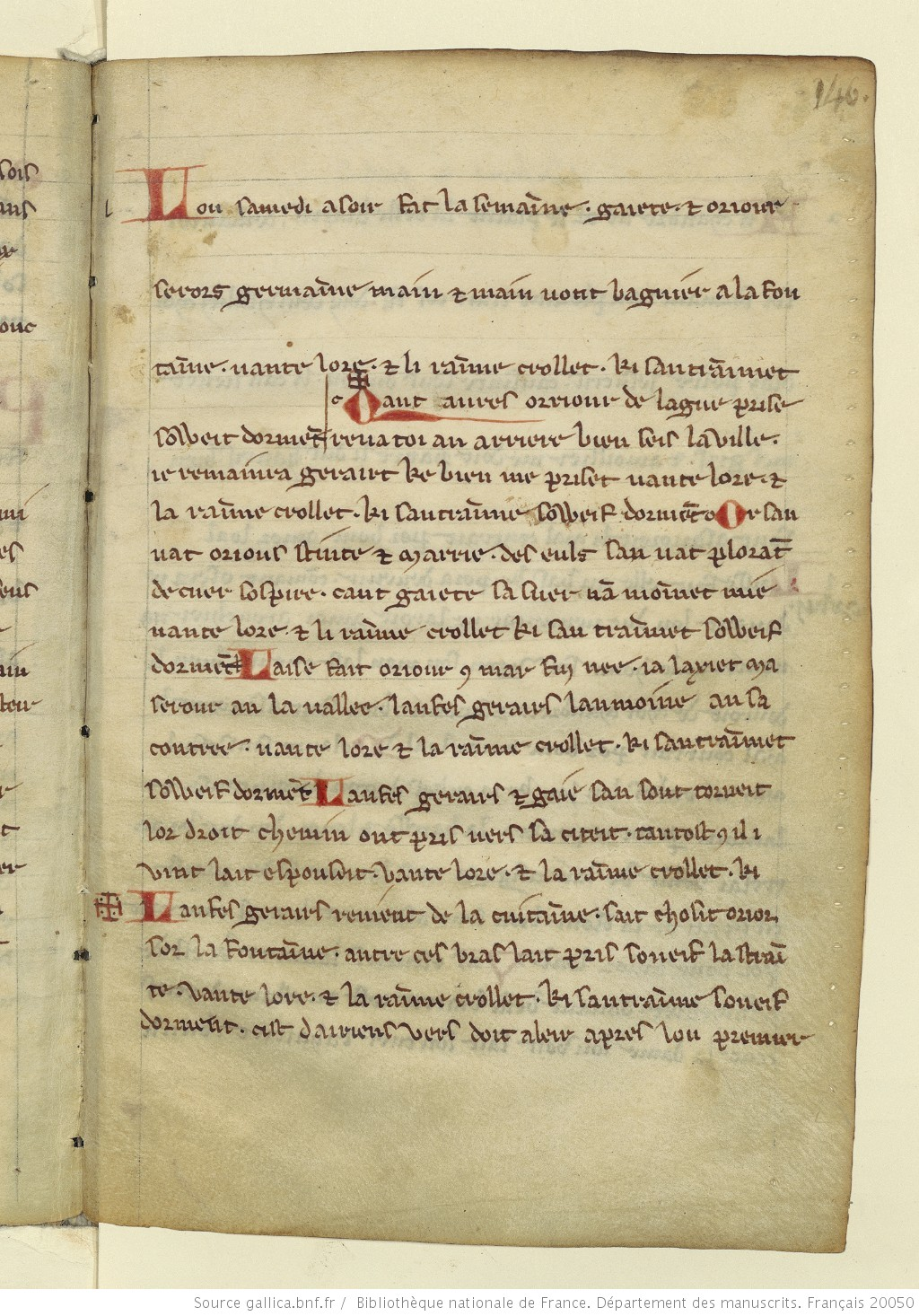 Fac-similé de la chanson de toile "Gaiete et Oriour" (Bibliothèque Nationale de France, Département des Manuscrits, Français 20050, f146r)